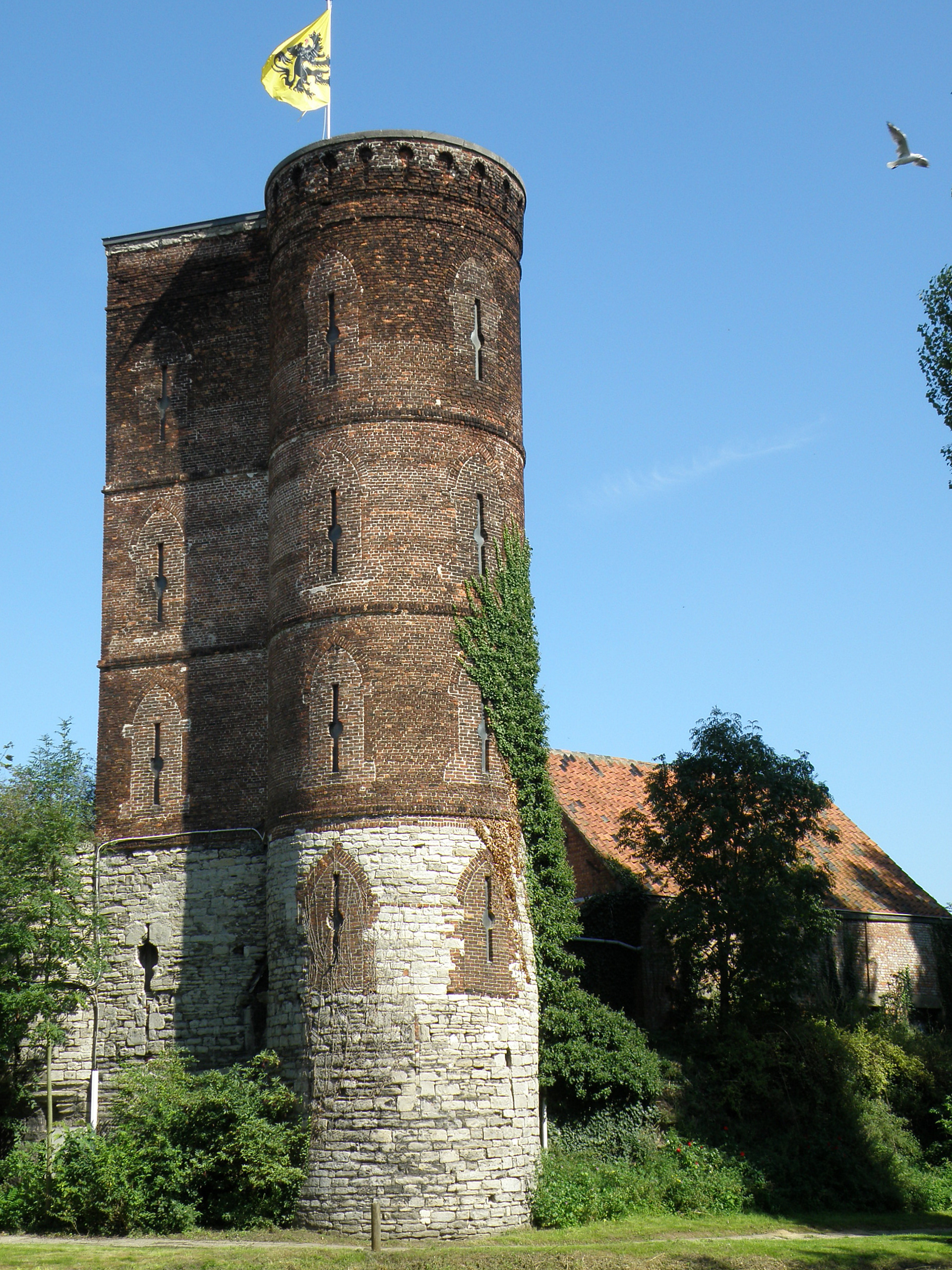 Rupelmonde (gem. Kruibeke, prov. Oost-Vlaanderen, België). Graventoren.